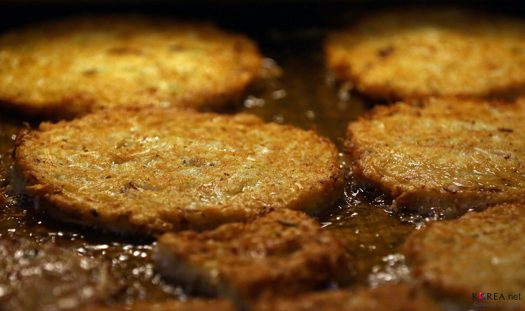 광장시장 빈대떡